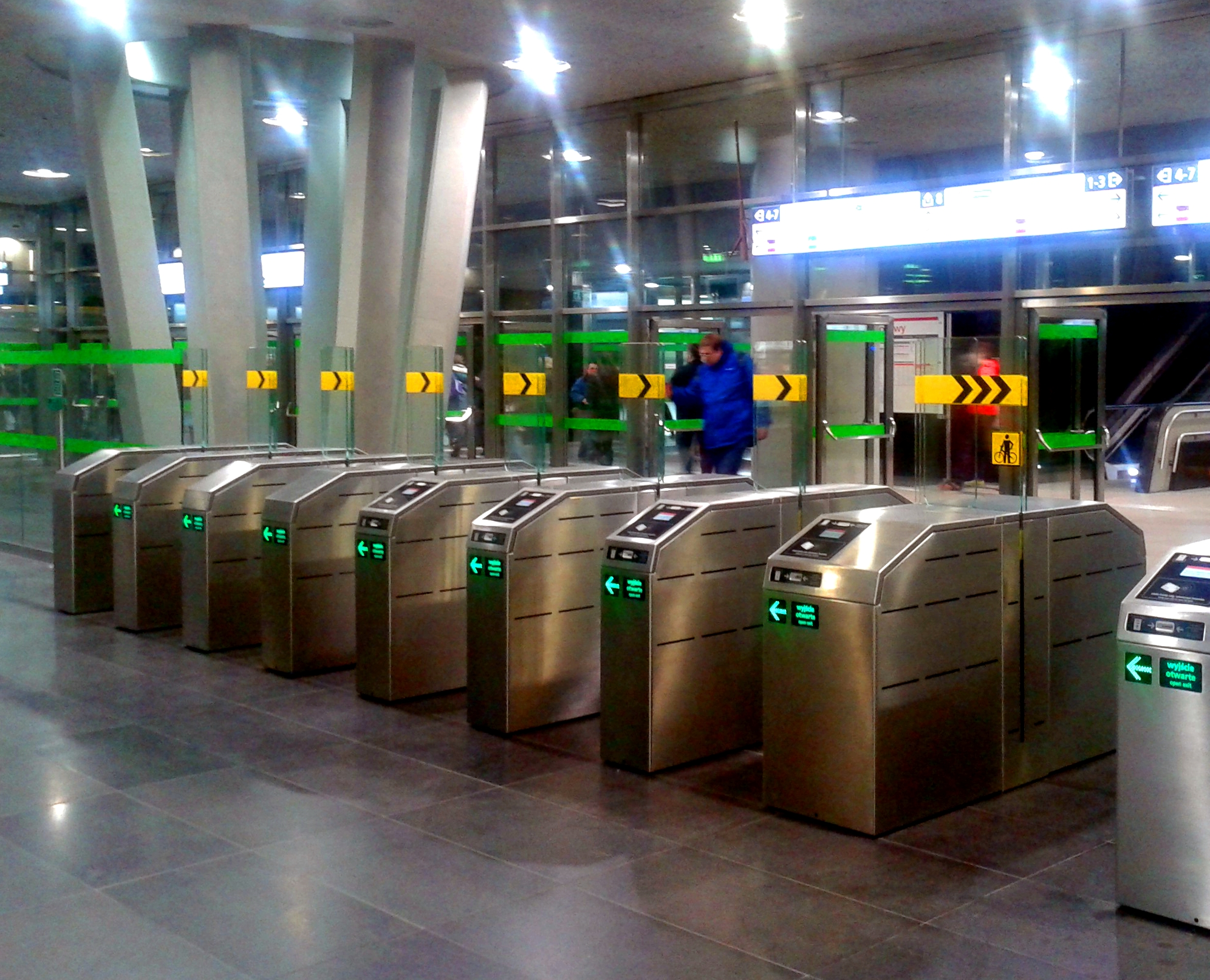 Bramki na stacji metra Stadion Narodowy